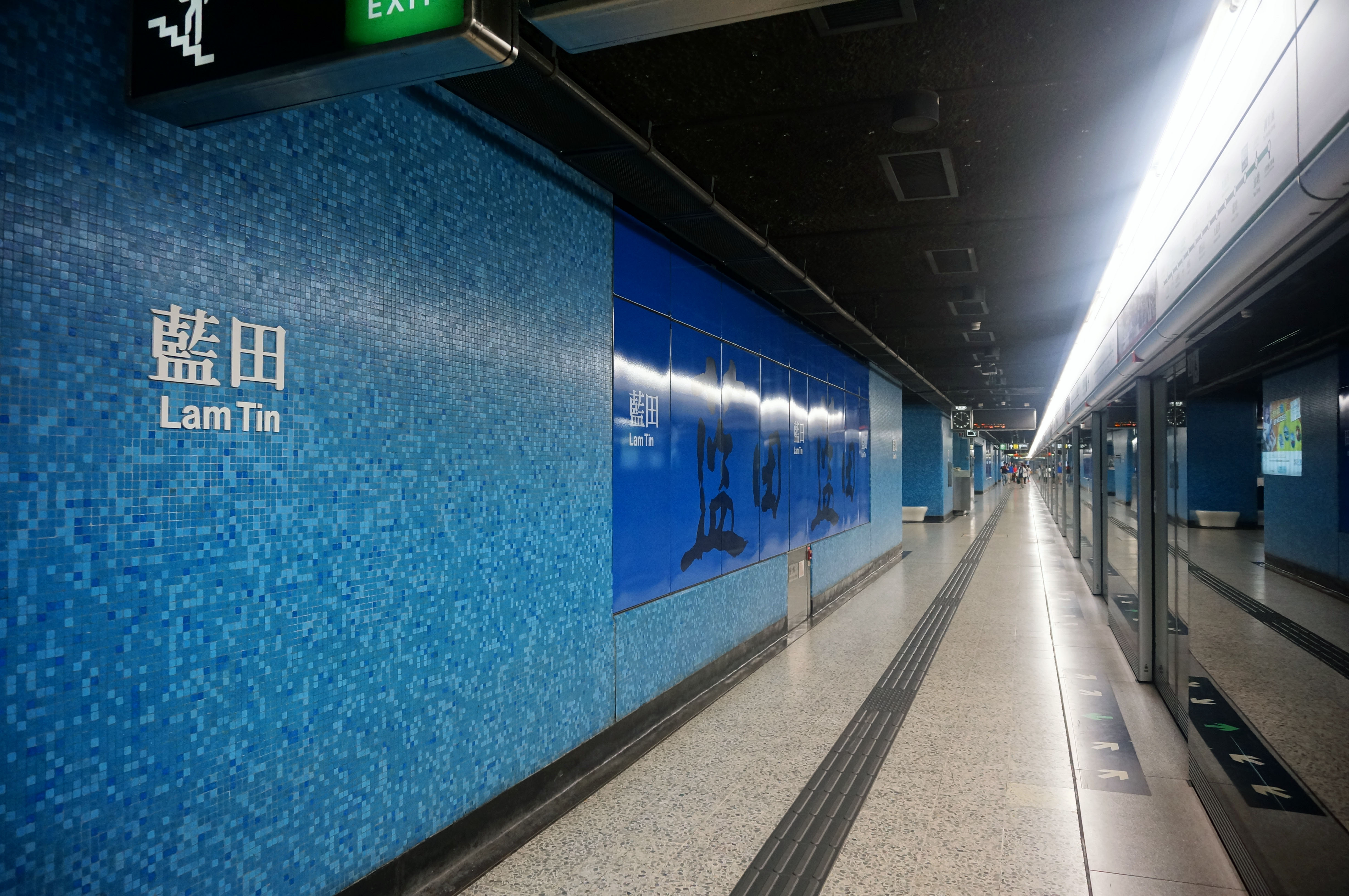 港鐵藍田站月台